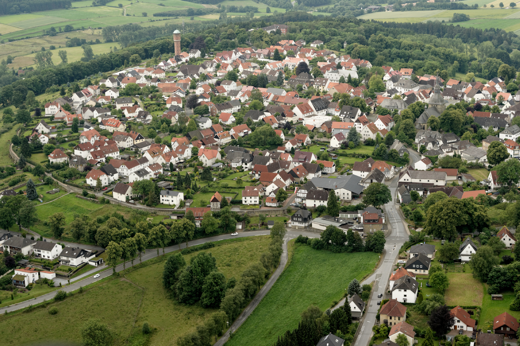 Fotoflug Sauerland Nord. Rüthen, historischer Ortskern mit Stadtmauer, Blickrichtung West The making of this document was supported by the Community-Budget of Wikimedia Germany.